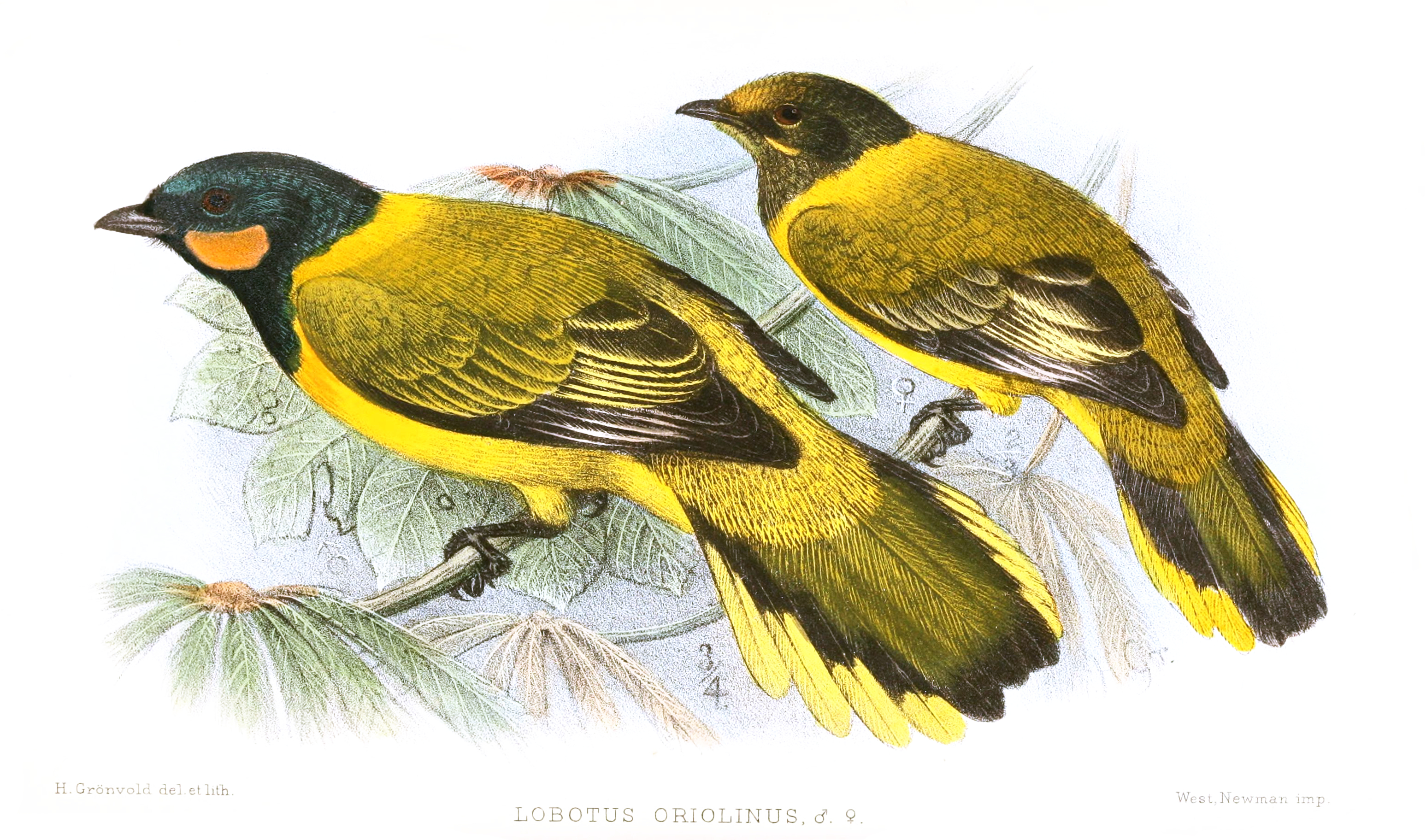 Échenilleur loriot